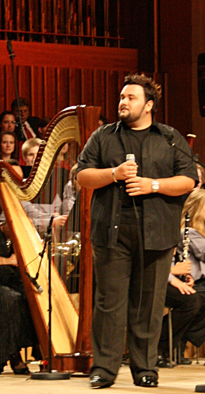 Dobrotvorni koncert "Križ nek' ti sačuva ime" u koncertnoj dvorani Vatroslav Lisinski u Zagrebu.